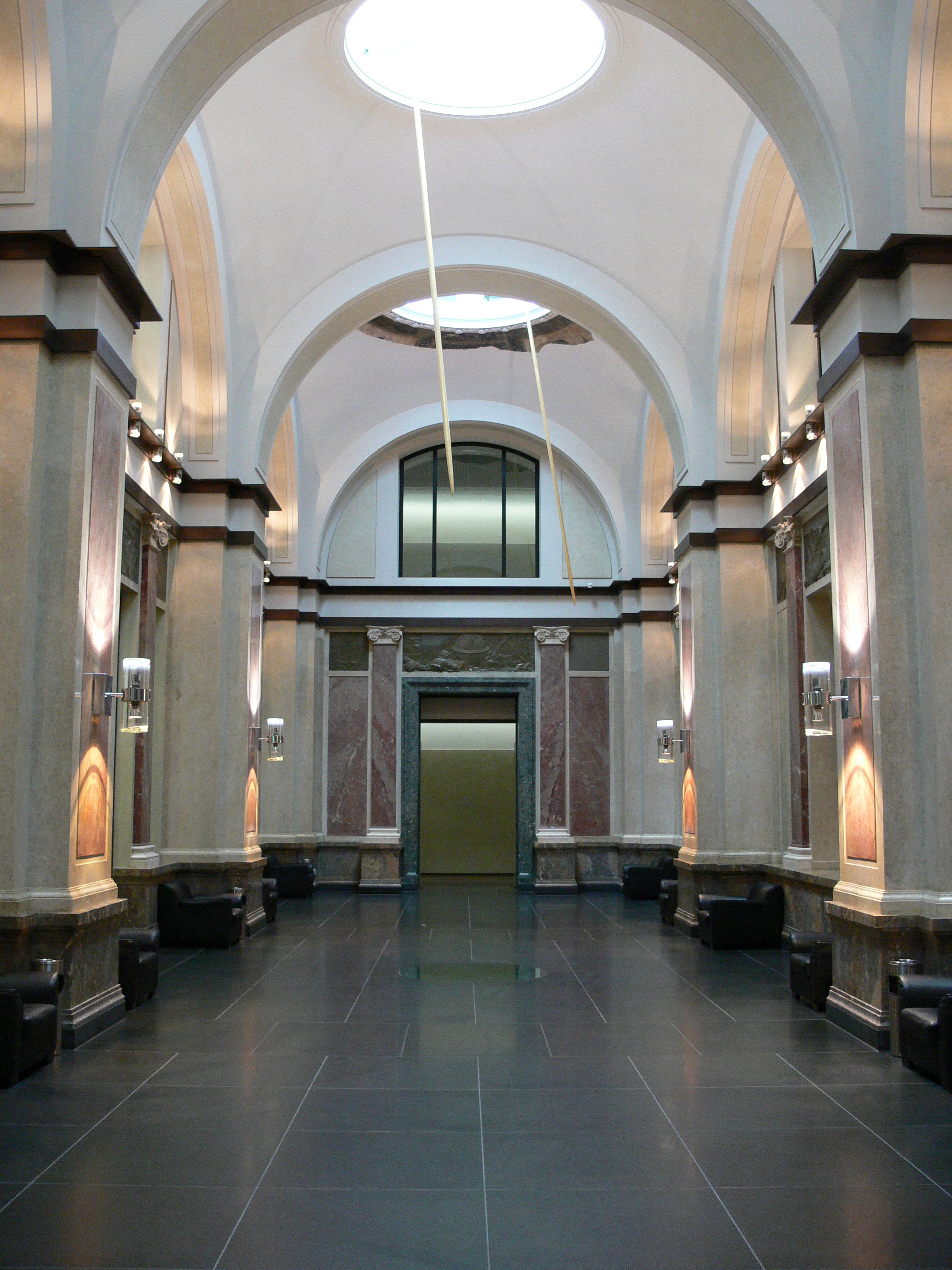 Wandelhalle Ehemaliges Preußisches Herrenhaus; Sitz des Bundesrats der Bundesrepublik Deutschland; Leipziger Straße, Berlin